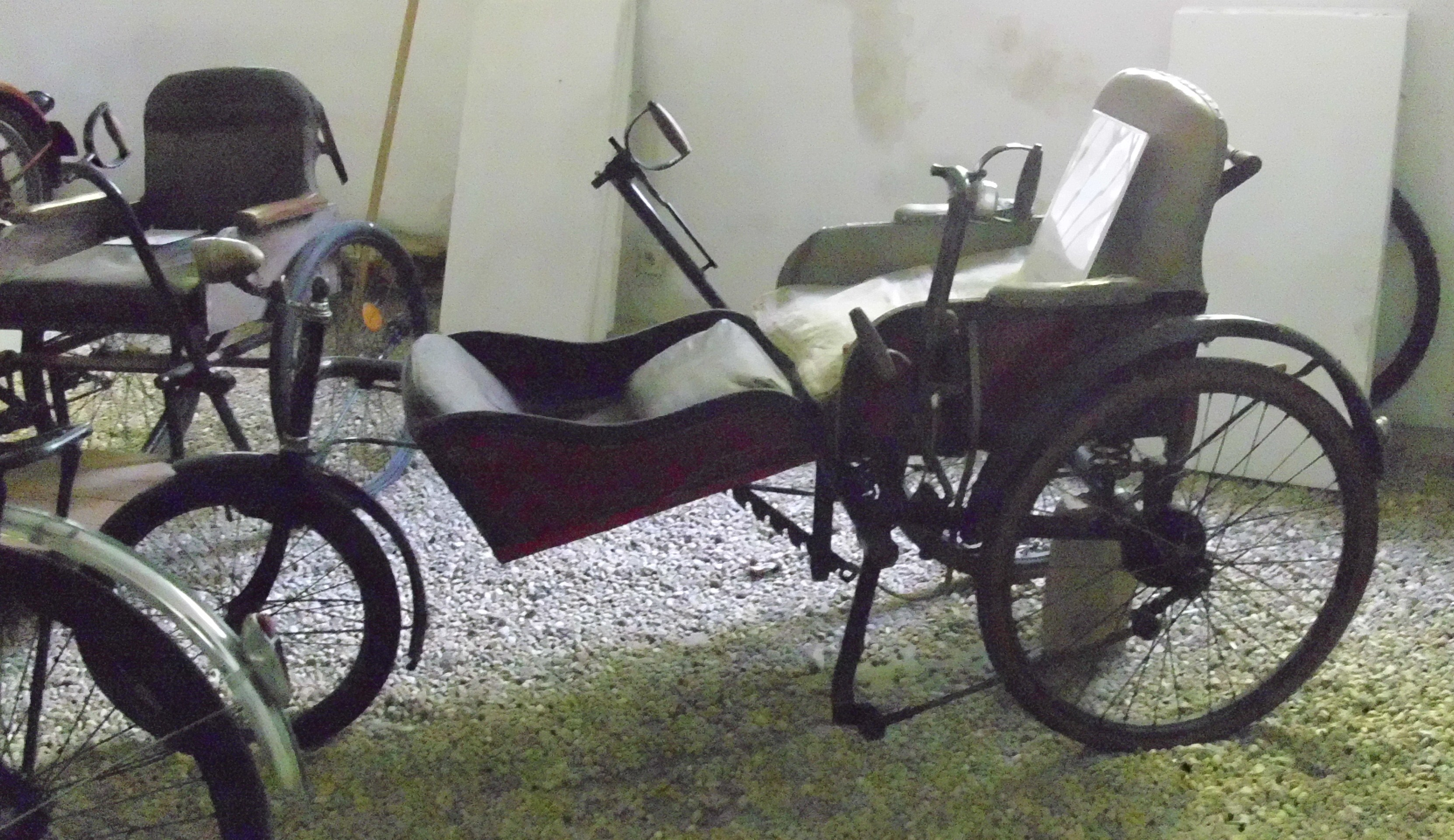 Petri + Lehr Rollstuhl von 1938 im Automobil- und Motorradmuseum Austria